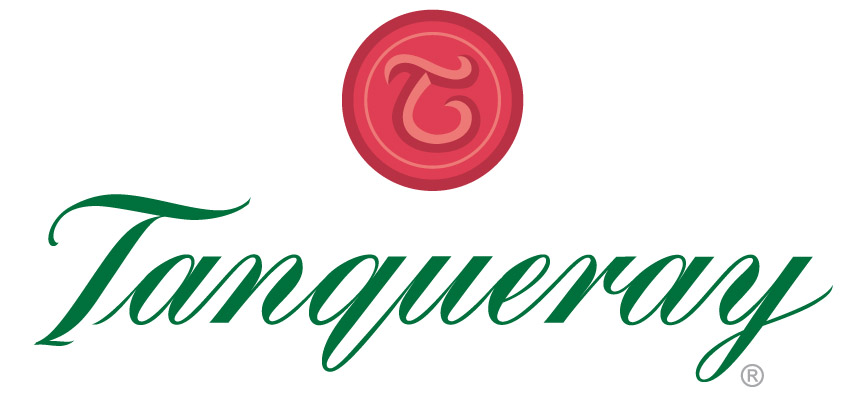 Logo von Tanqueray